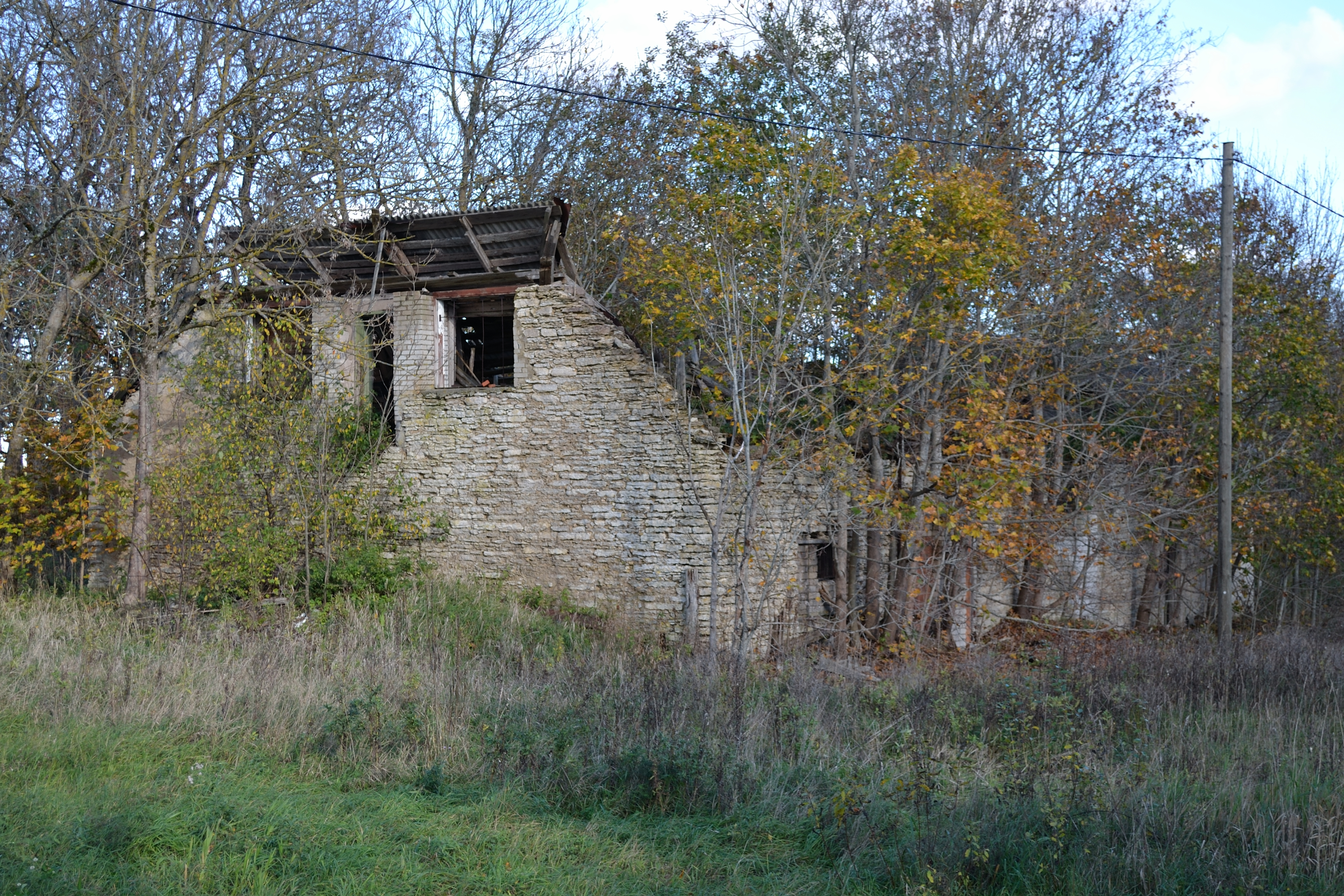 Ääsmäe mõisa ait-kuivati varemed, 18.-20.sajand